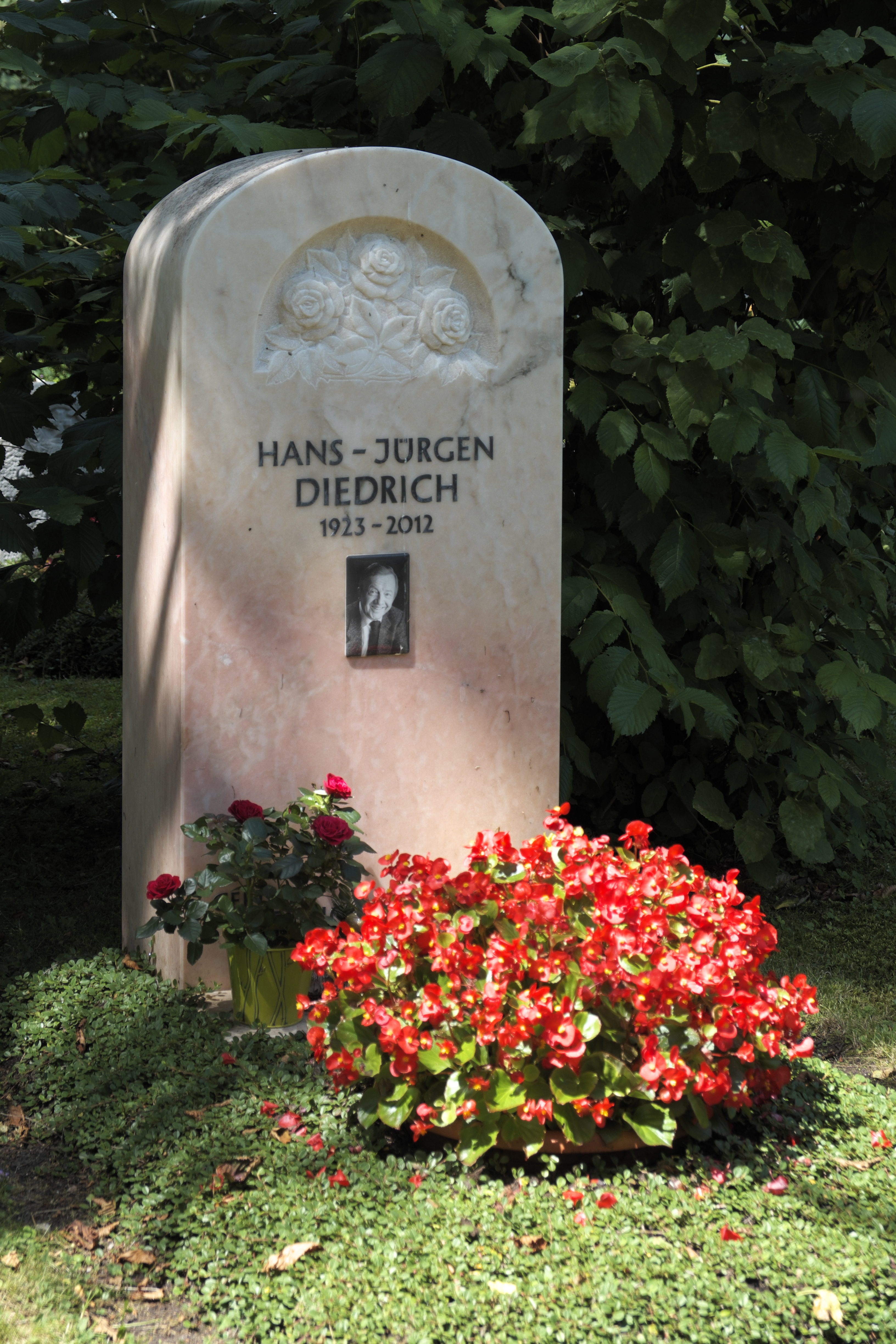 Waldfriedhof Obermenzing an der Bergsonstraße in Obermenzing im Stadtbezirk Pasing-Obermenzing in München (Bayern/Deutschland), Grab von Hans Jürgen Diedrich